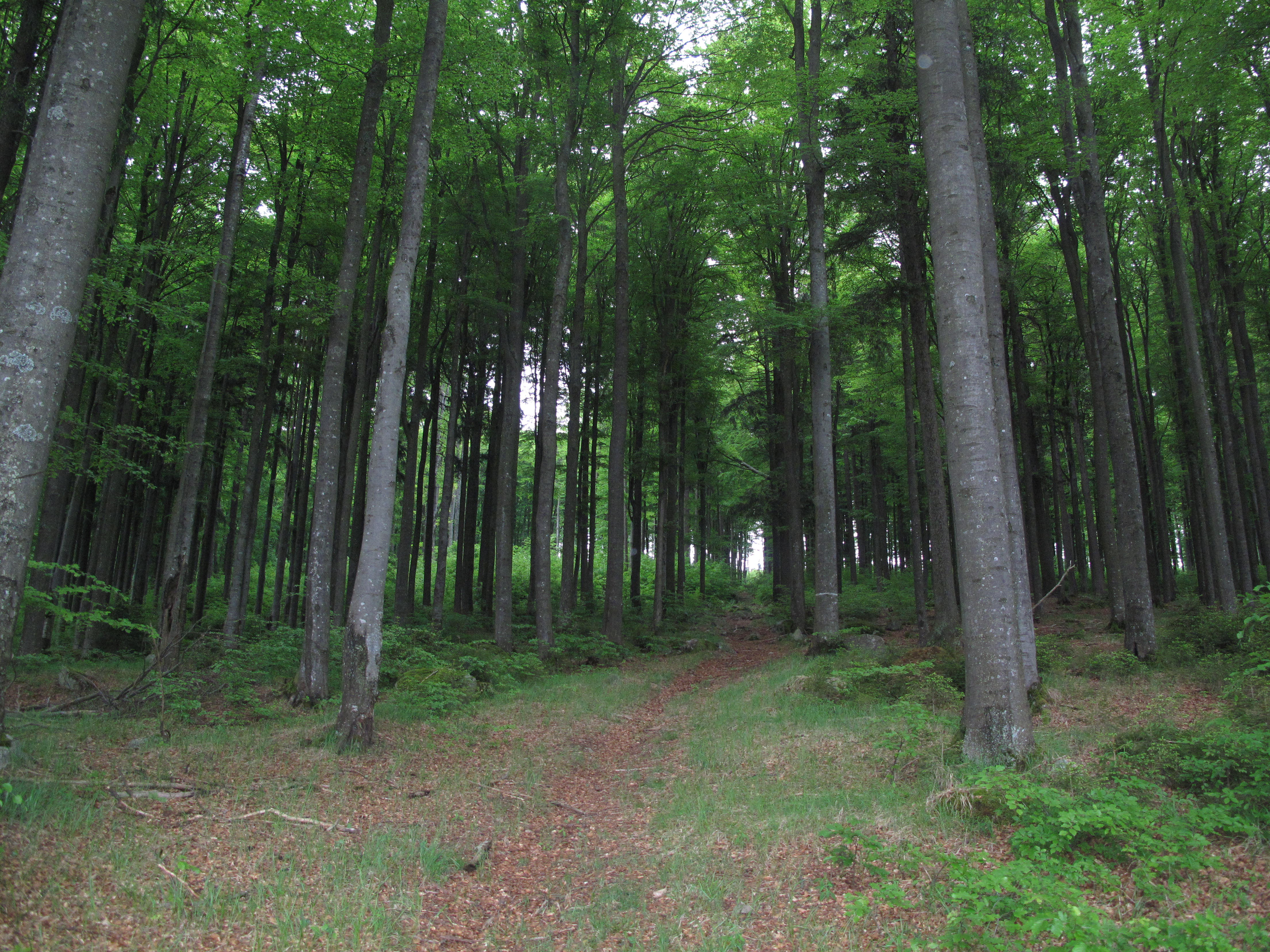 Přírodní památka Myslivna